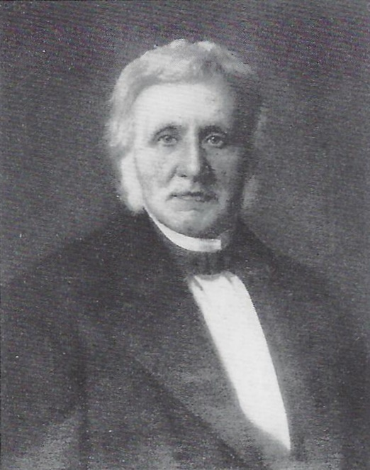 Schwarz-weiß-Fotografie eines Ölgemäldes von Ernst August Hagen (1797-1880); Kriegsverlust.